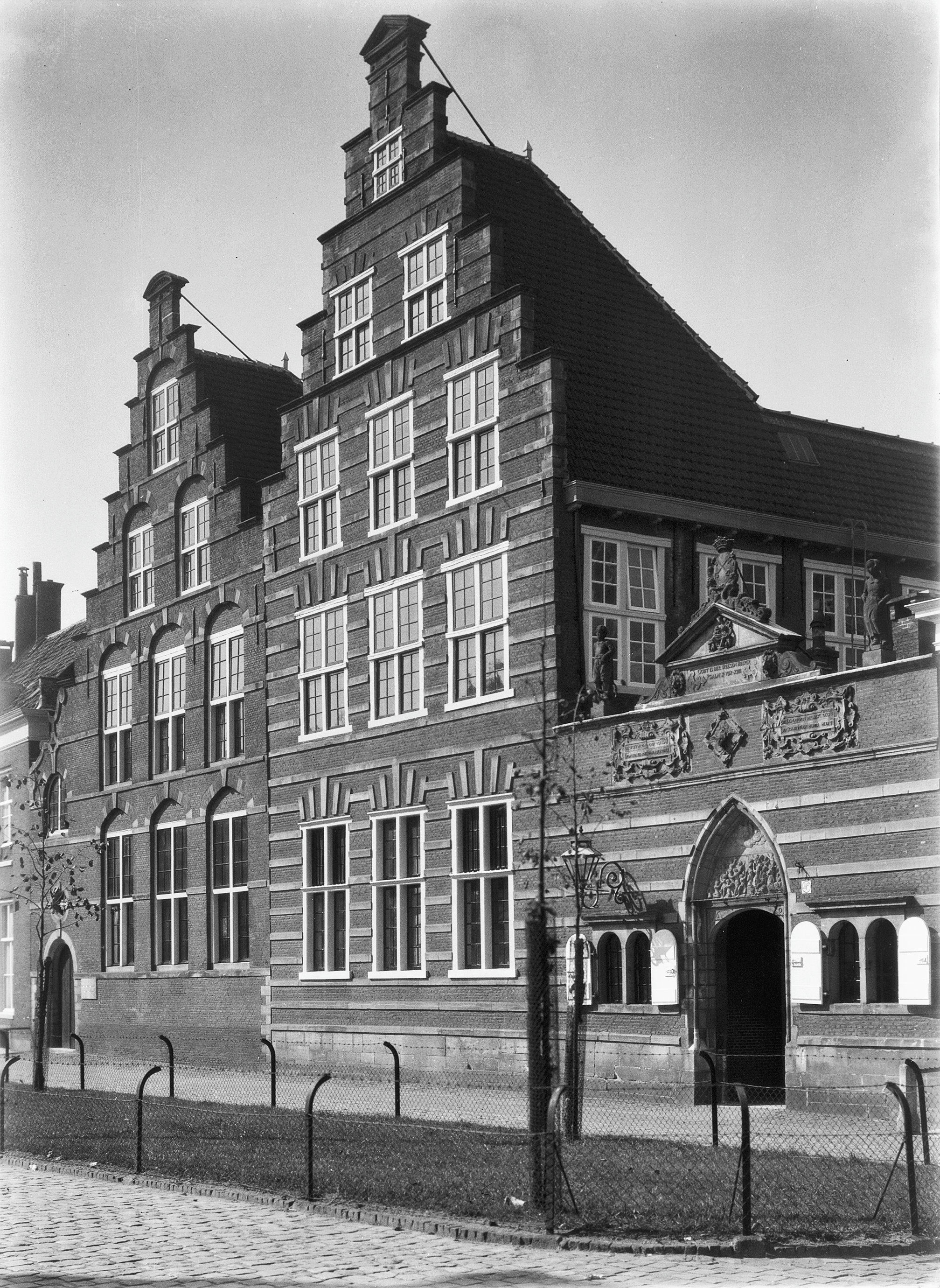 Weeshuis: aanzicht